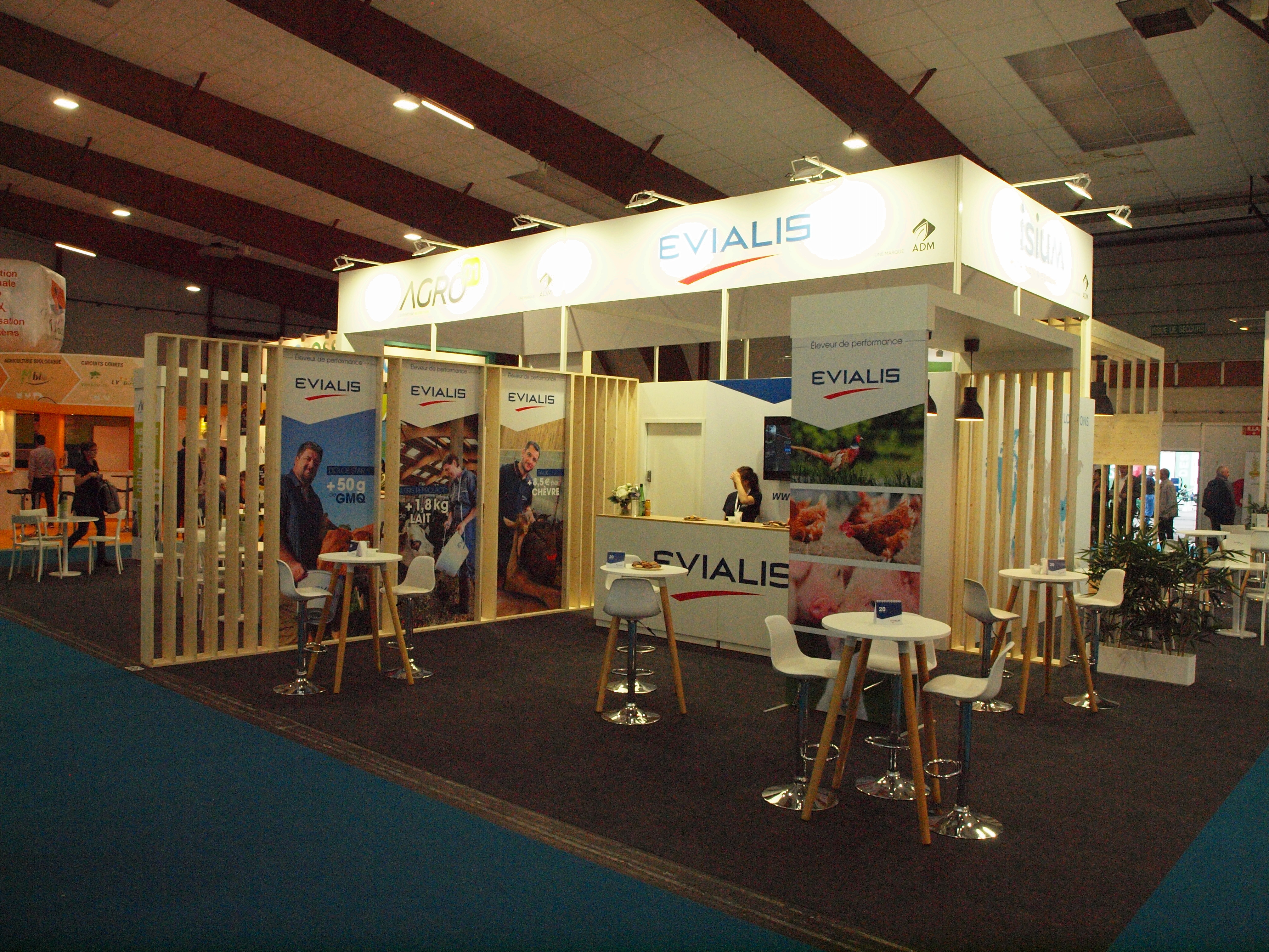 SPACE de Rennes (Ille-et-Vilaine, France) en 2019 ; les stands à l'intérieur de halls